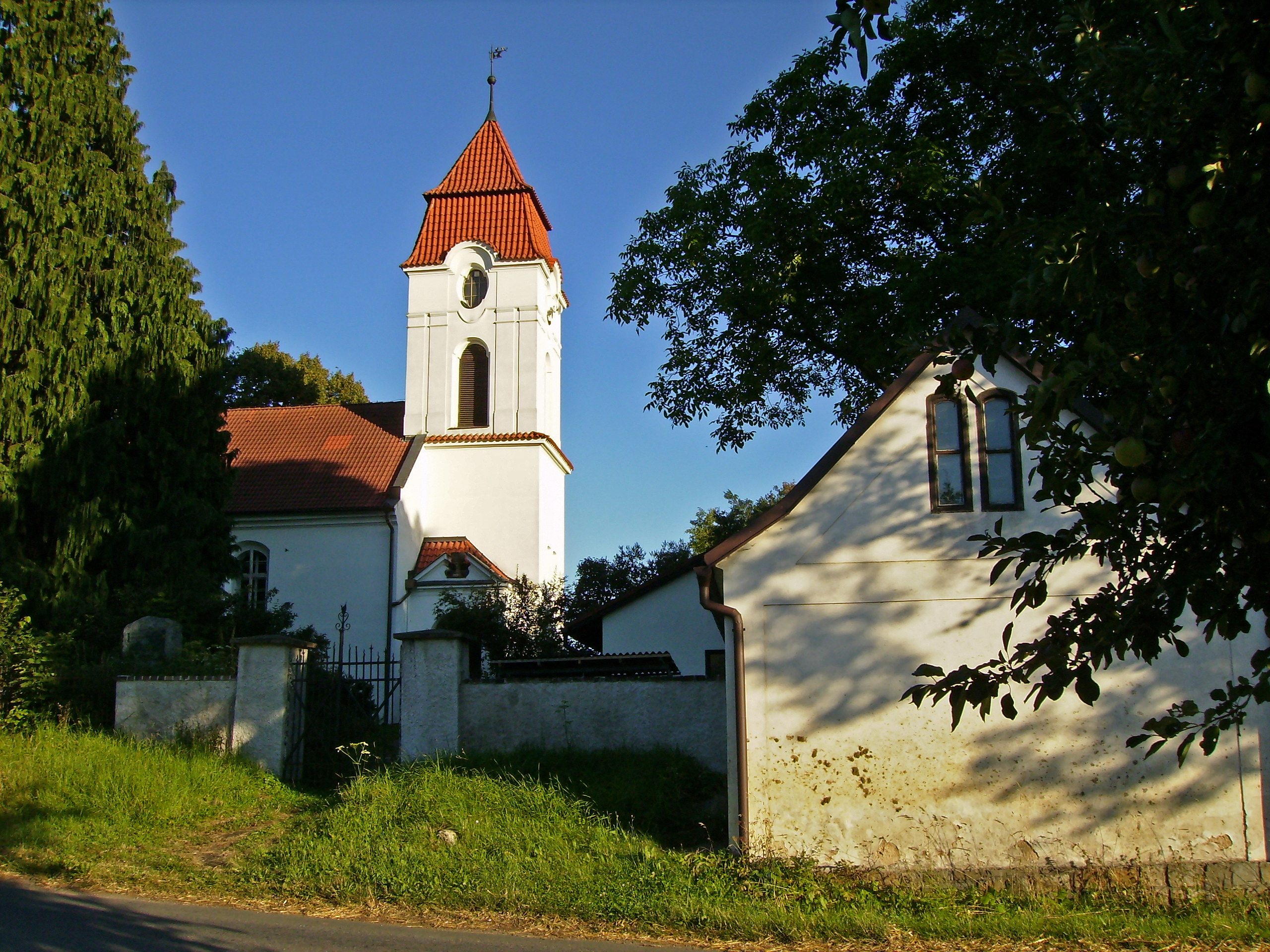 Kostel Českobratrské církve evangelické v Soběhrdech